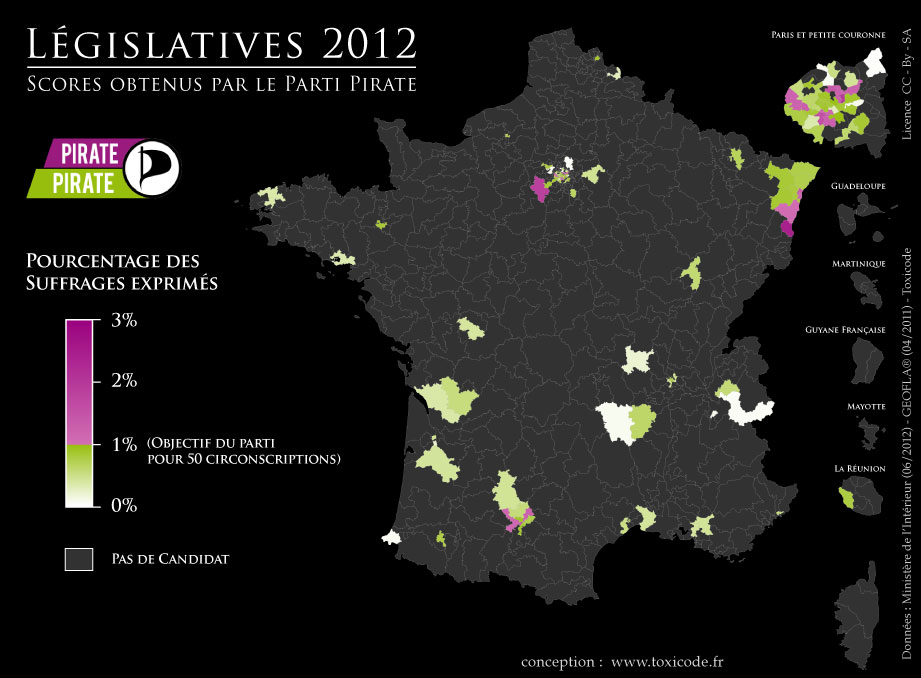 Cette carte représente les résultats des candidats du Parti Pirate au premier tour des élections législatives de 2012